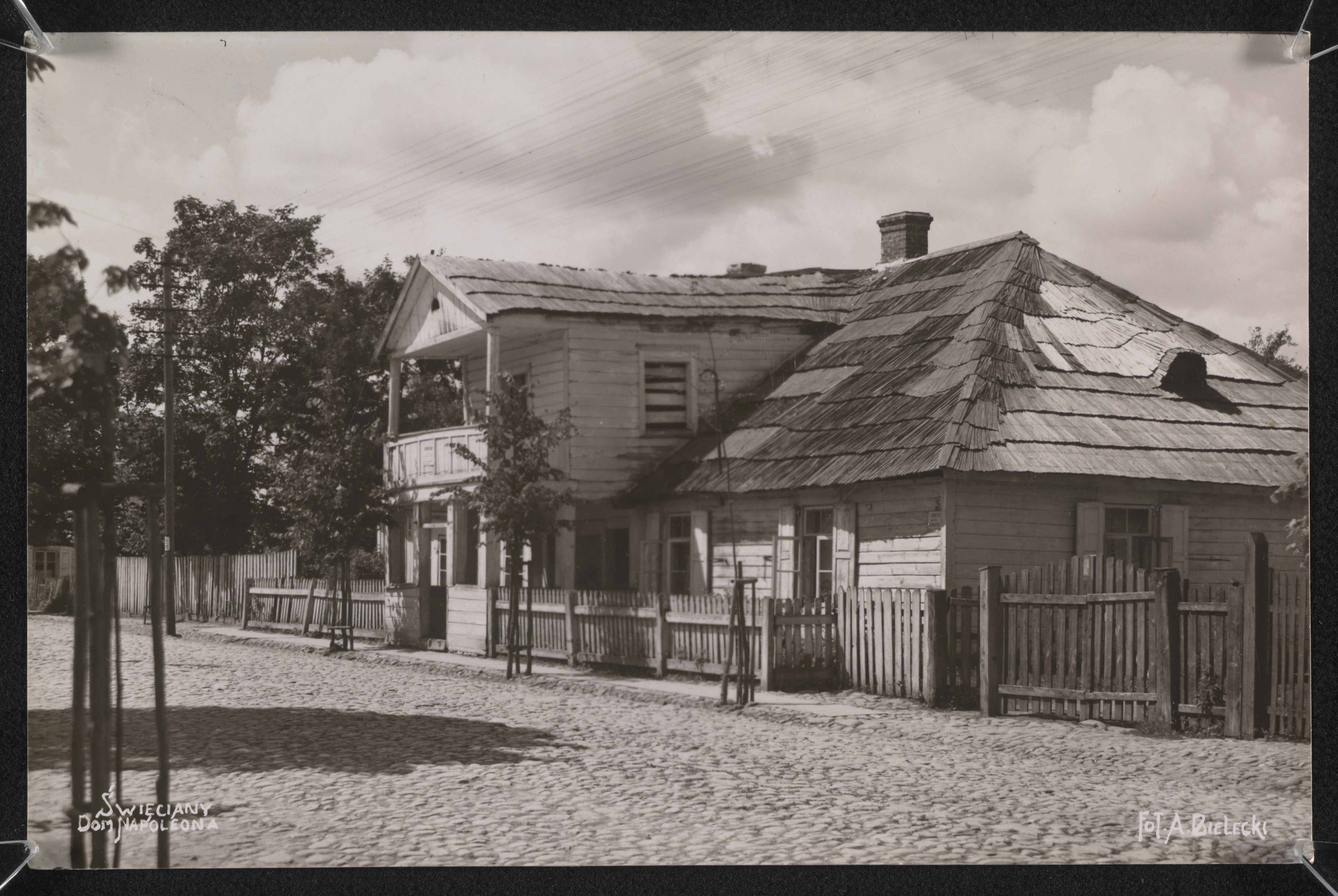 Беларуская (тарашкевіца): Сьвянцяны (Śvianciany), неідэнтыфікаваная вуліца. Дом, дзе спыняўся Напалеон